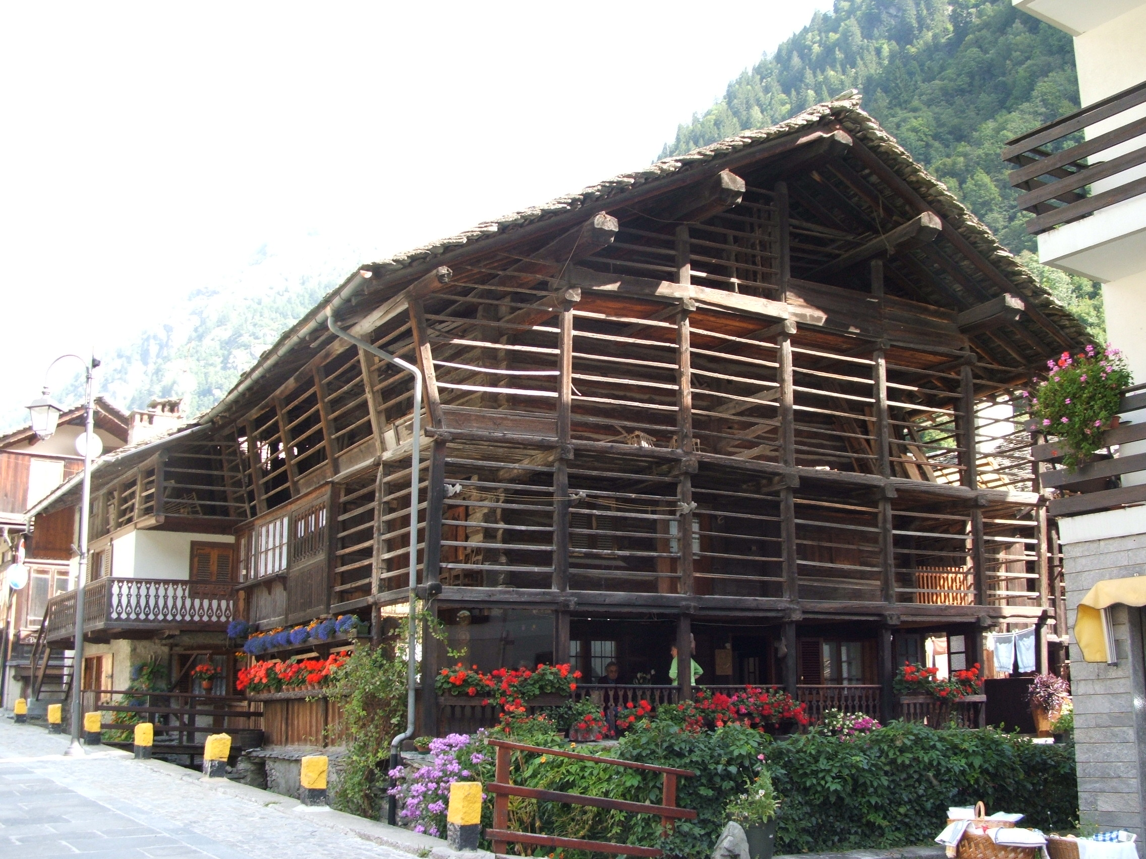 Immagine da Alagna Valsesia